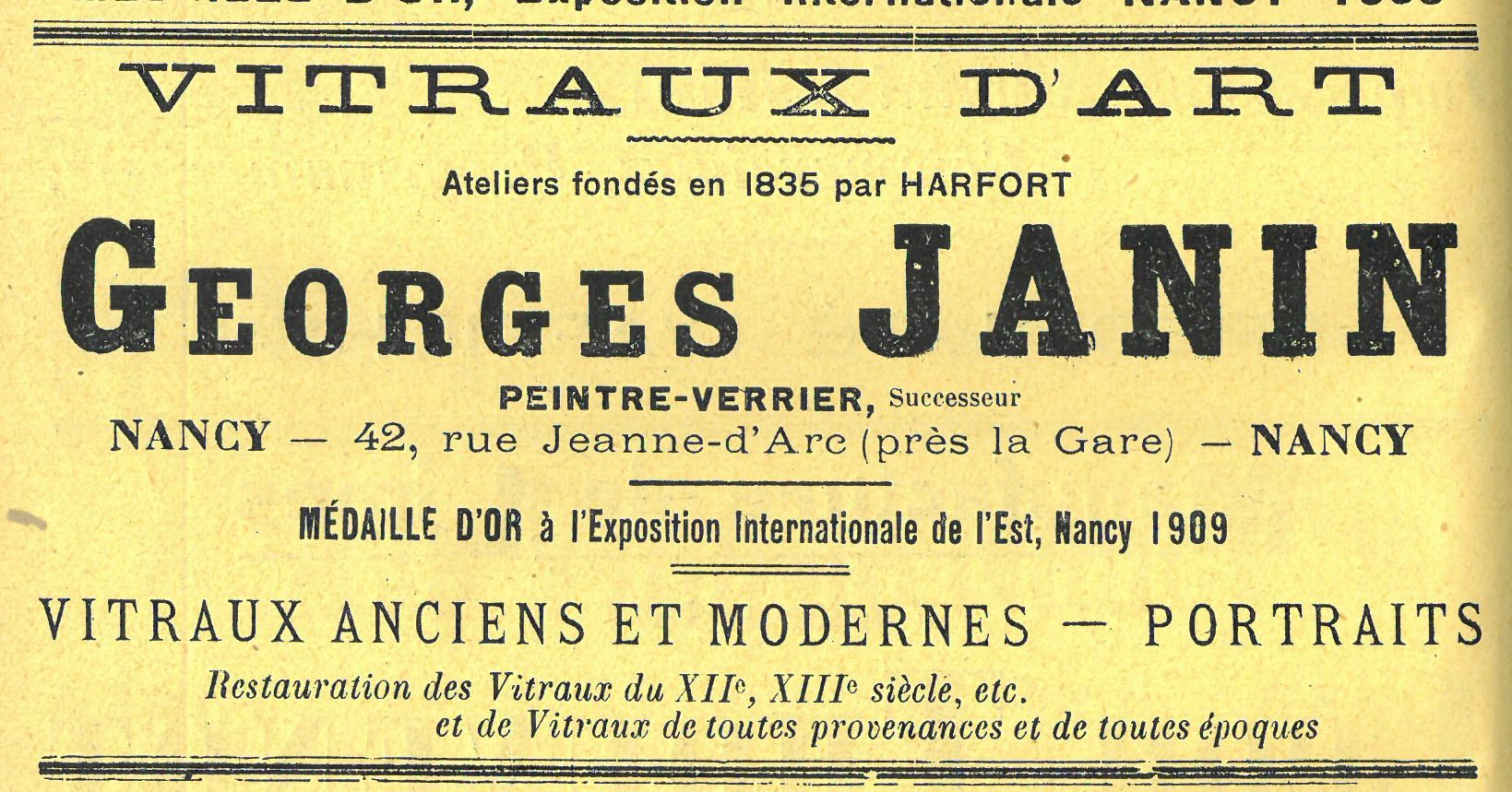 Réclame issue de Annuaire administratif, statistique, historique, judiciaire et commercial de Meurthe-et-Moselle 1910